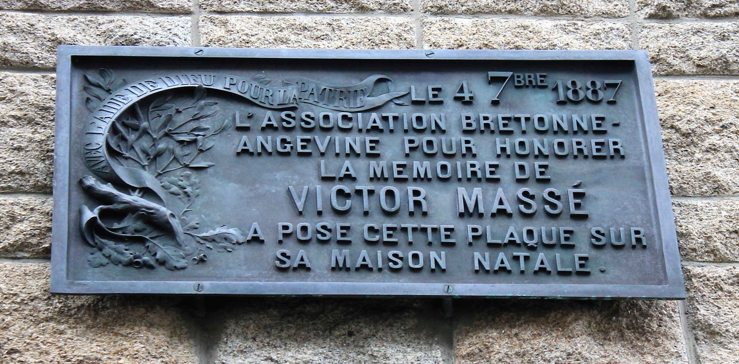 plaque commémorative posée par l'association Bretonne angevine en 1887 pour marquer l'emplacement de la maison de naissance de Victor Massé à Lorient.